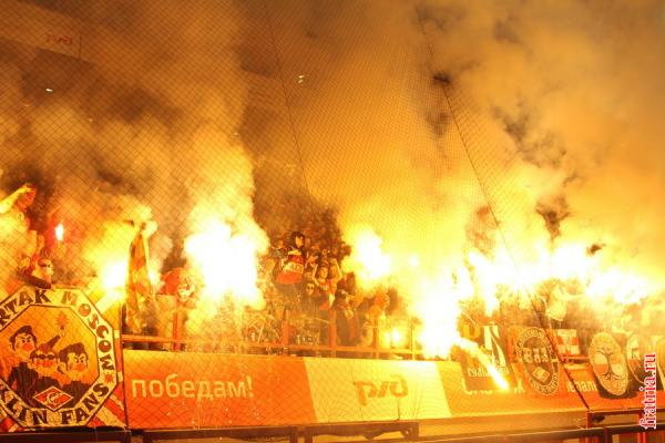 Пиротехническое шоу на матче с "Локомотивом"